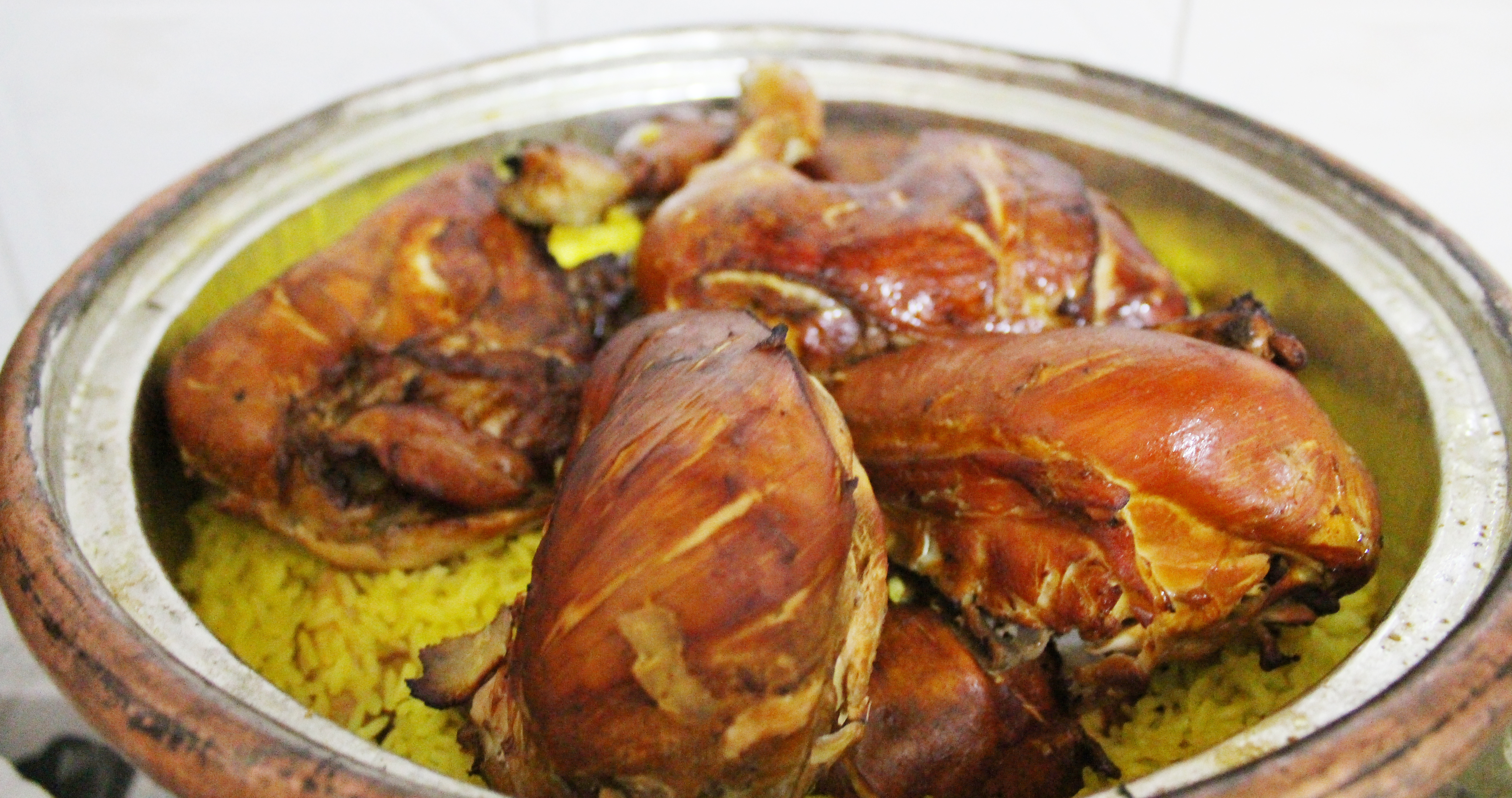 القدرة هي من الأكلات الشعبية الفلسطينية وخصوصاً في مدينة الخليل